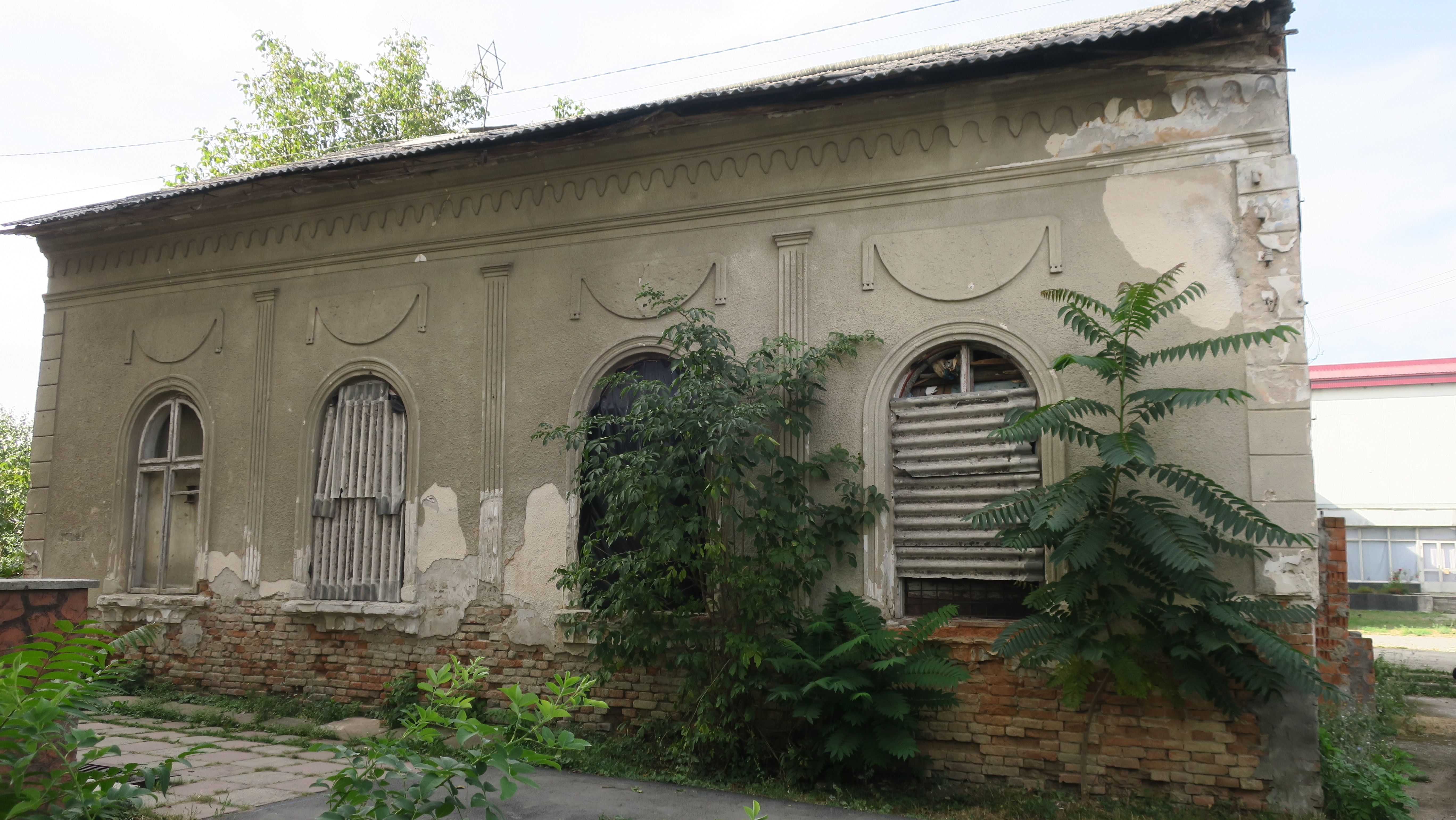 Synagoge in Novoselyzja (2019)